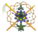 Escudo Pilatos